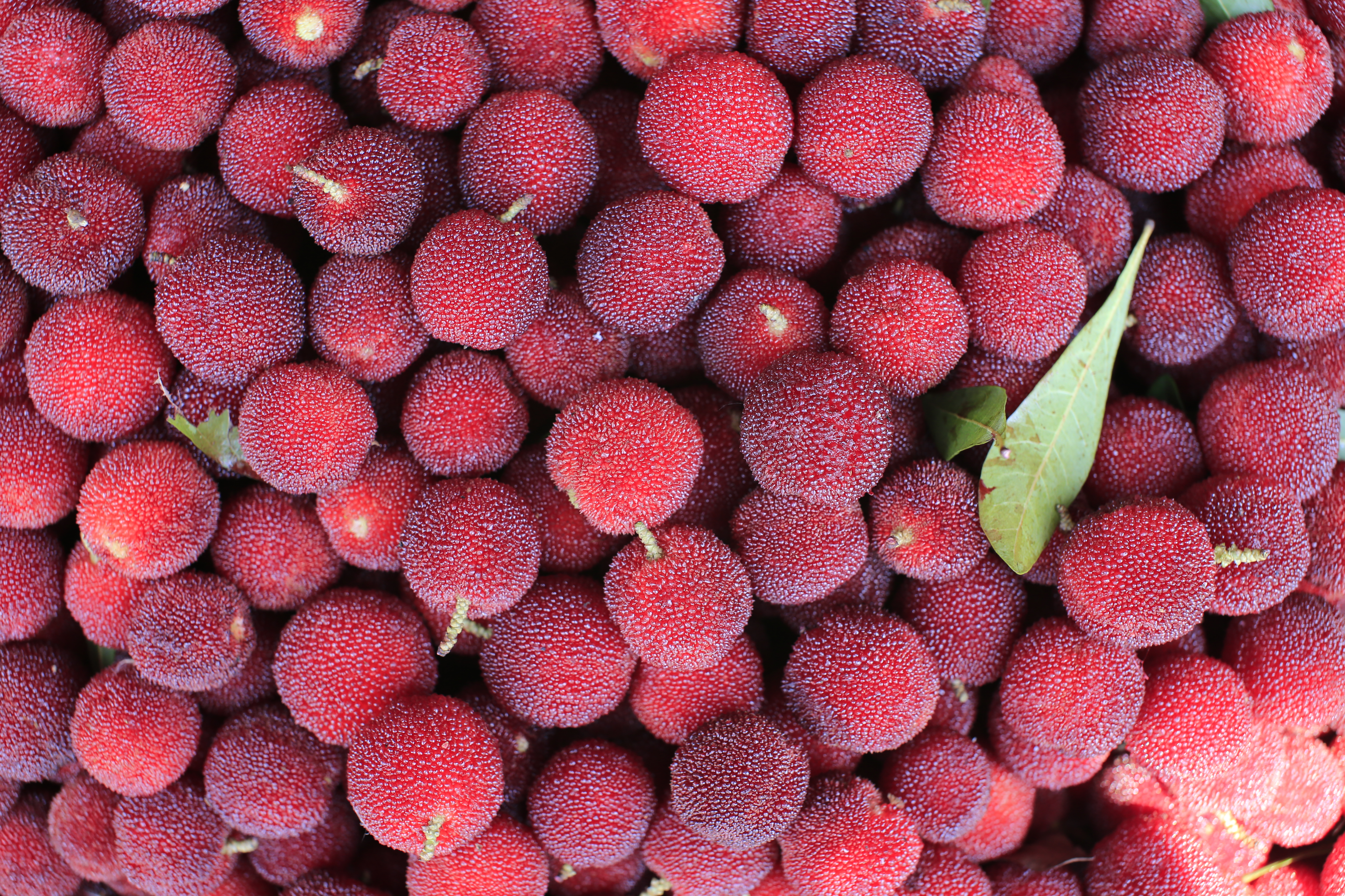 杨梅，产于江西省乐平市历居山